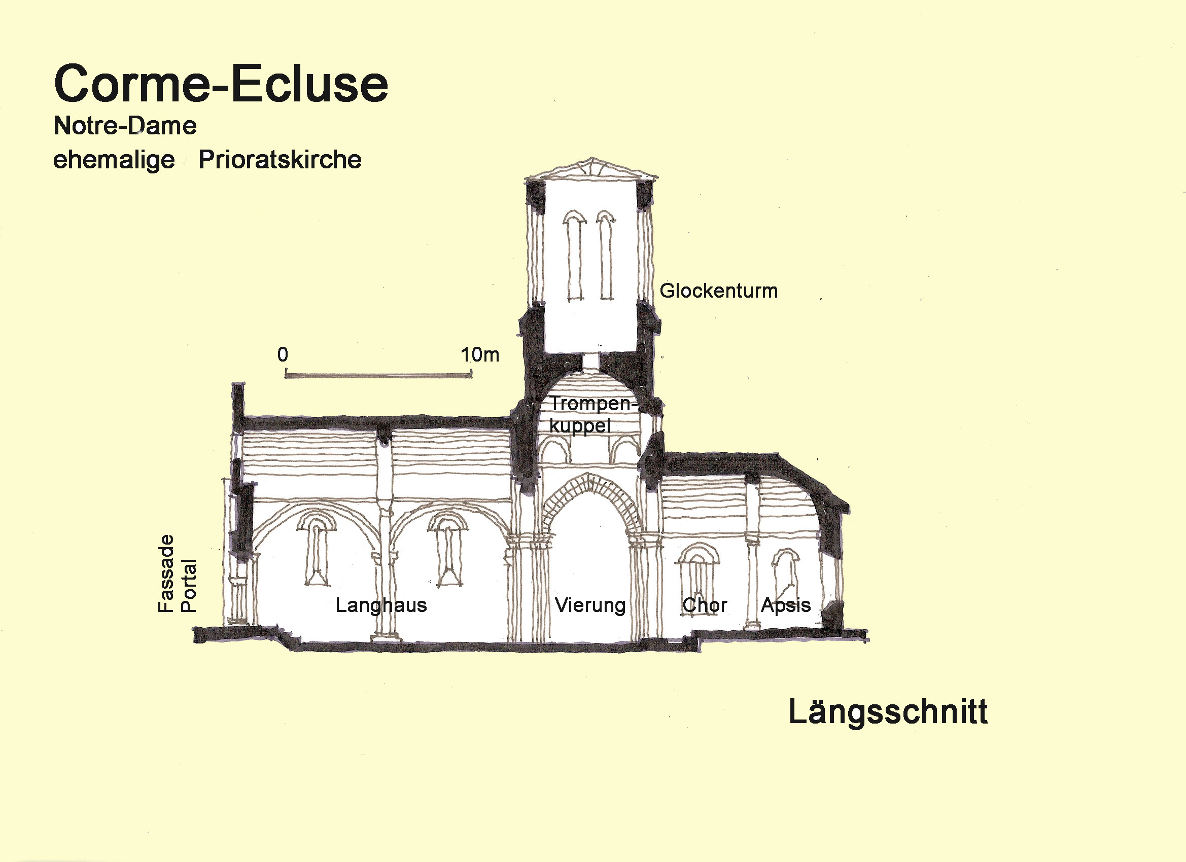 Corme-Écluse.Längsschnitt, Handskizze